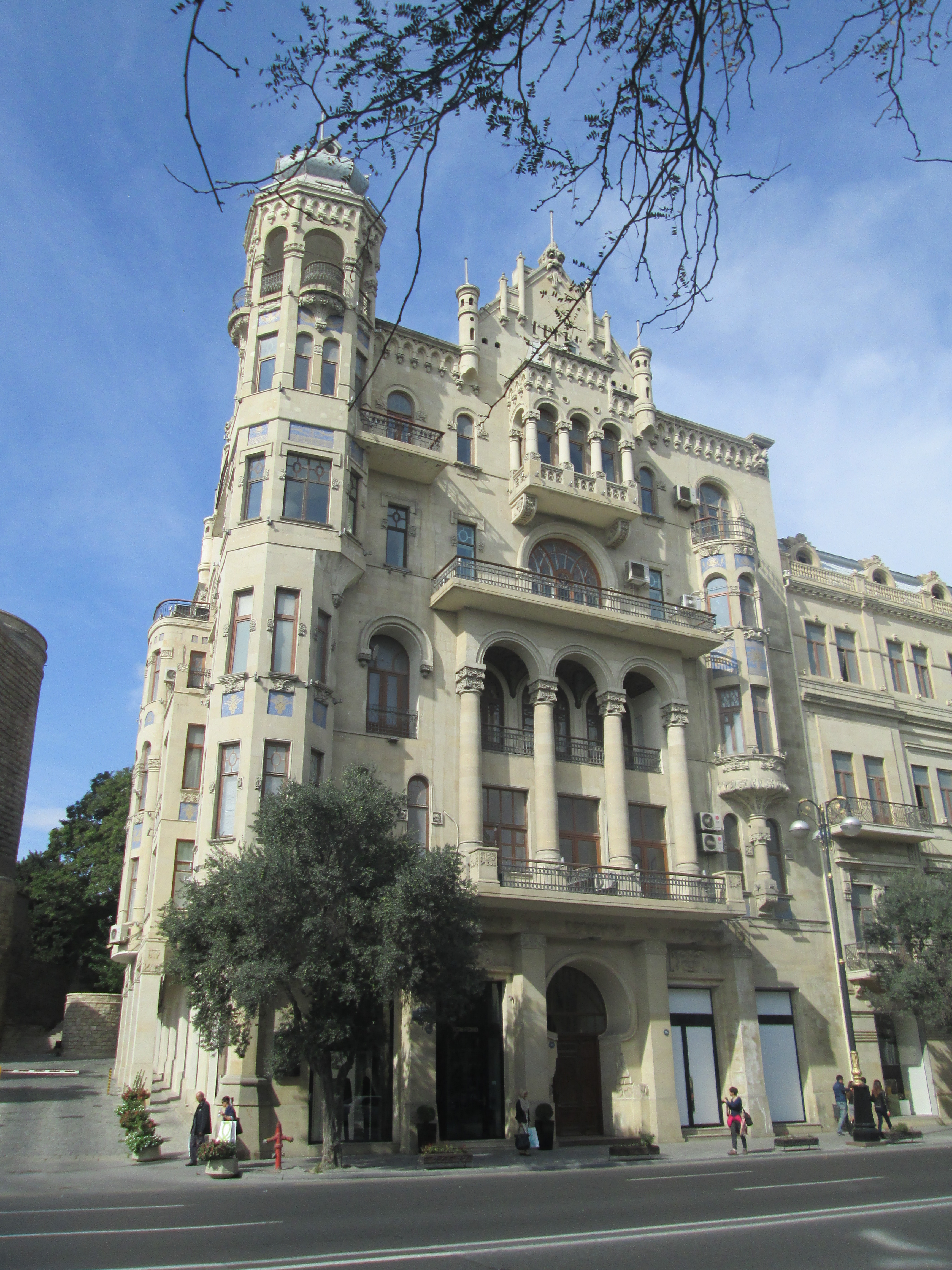 Hacınski villası